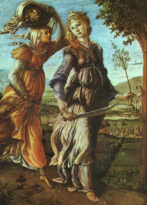 Pintura renacentista